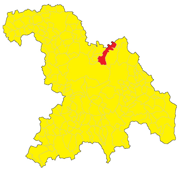 Mappa del comune di Alluvioni Piovera (AL)